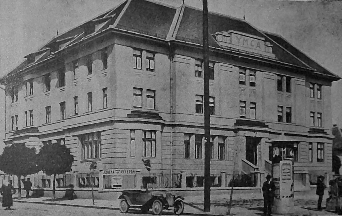 Budova Ymcy, Lučenec rok 1926